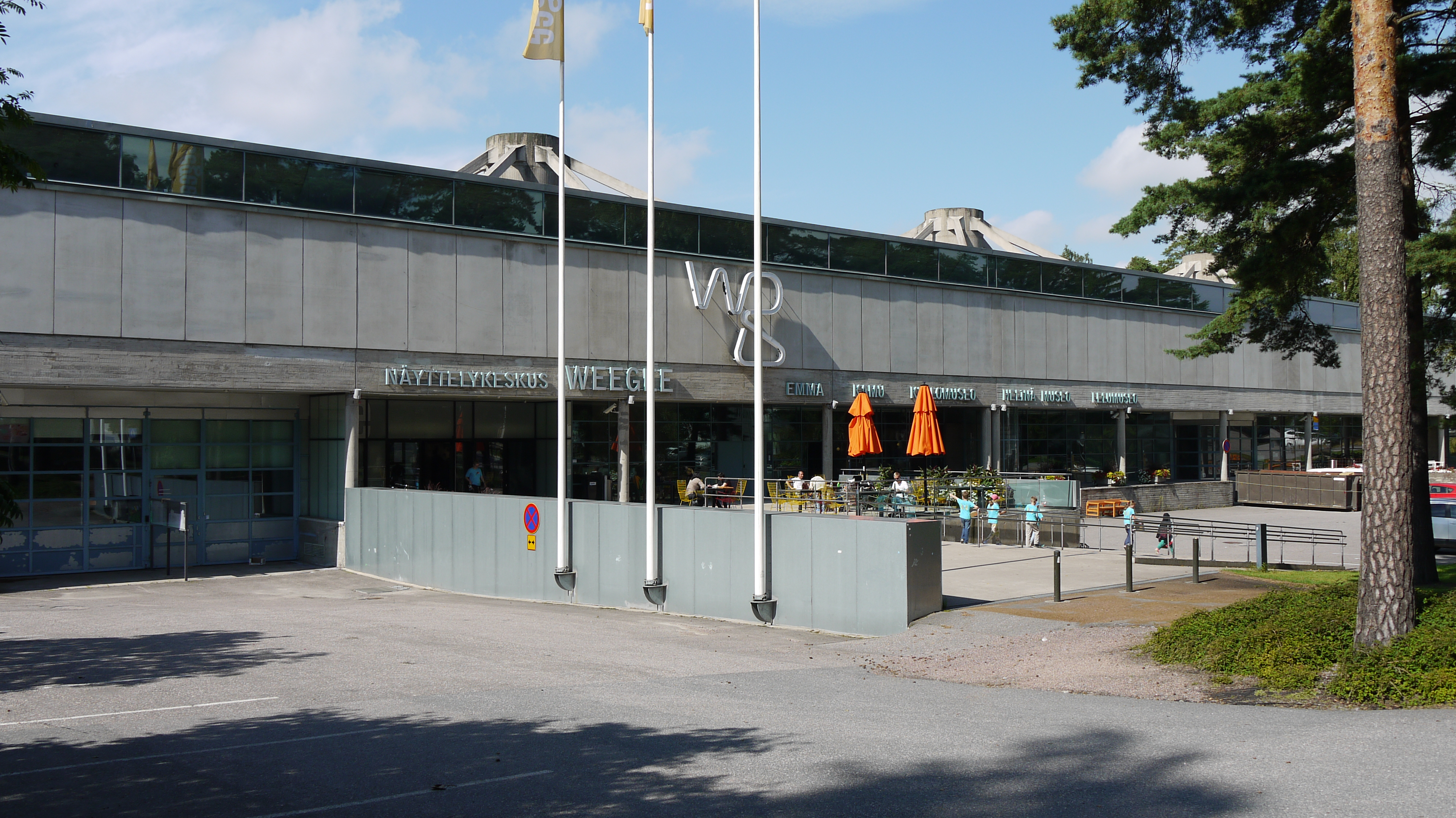 WeeGee-talo Espoon Tapiolassa